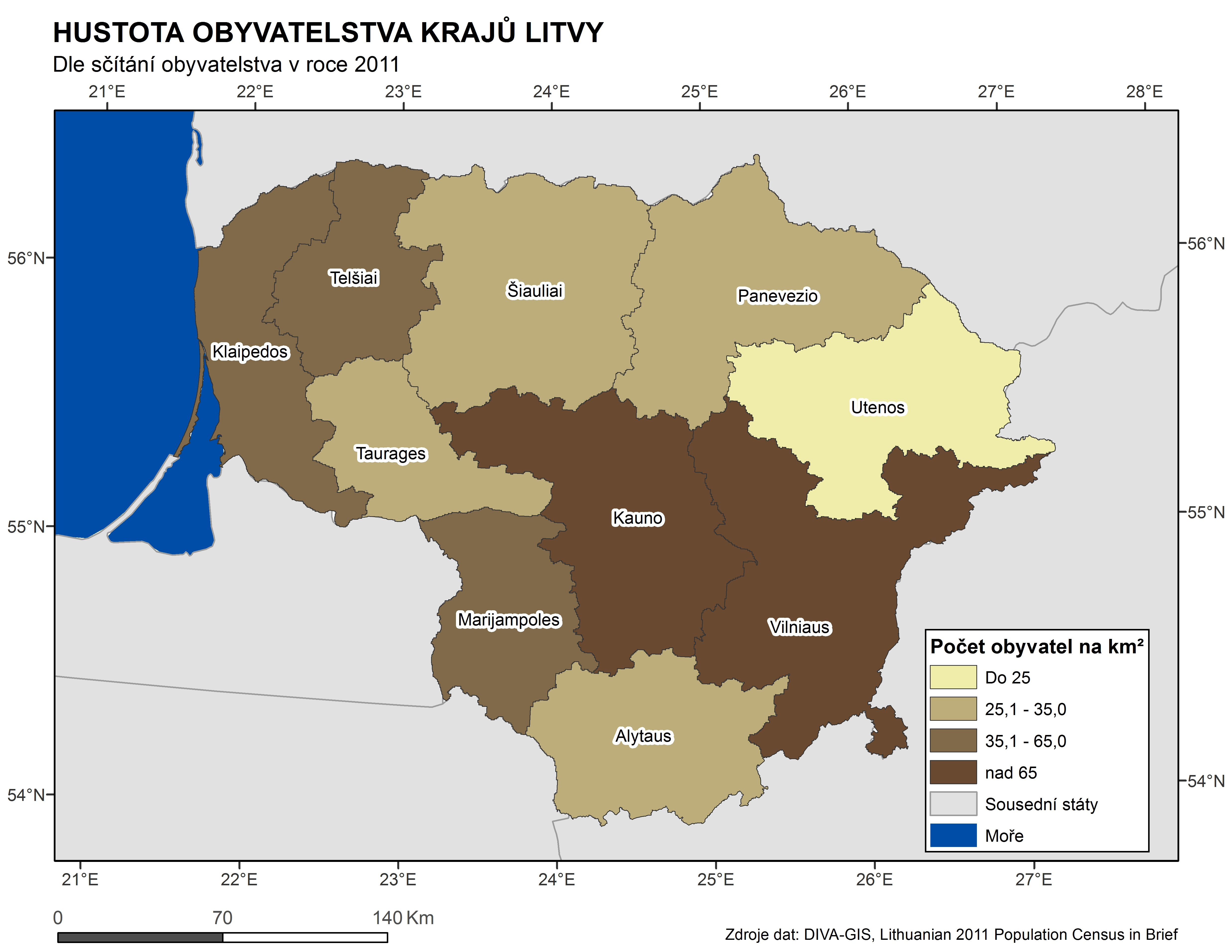 Ukázka kartogramu